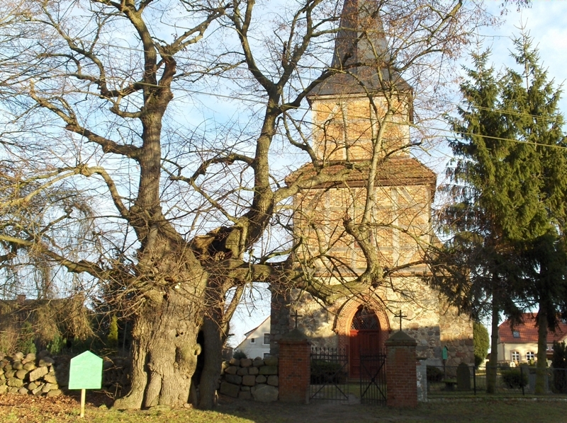 Feldsteinkirche und Franzosenlinde in Bargischow